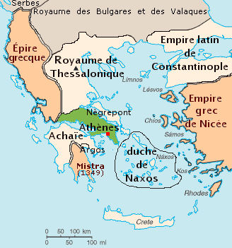 Carte du duché d'Athènes en 1204 Auteur : Cornelis